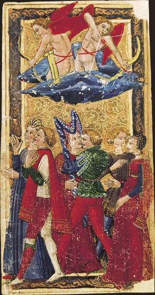 Charles VI (or Gringonneur) Deck; Le tarot dit de Charles VI